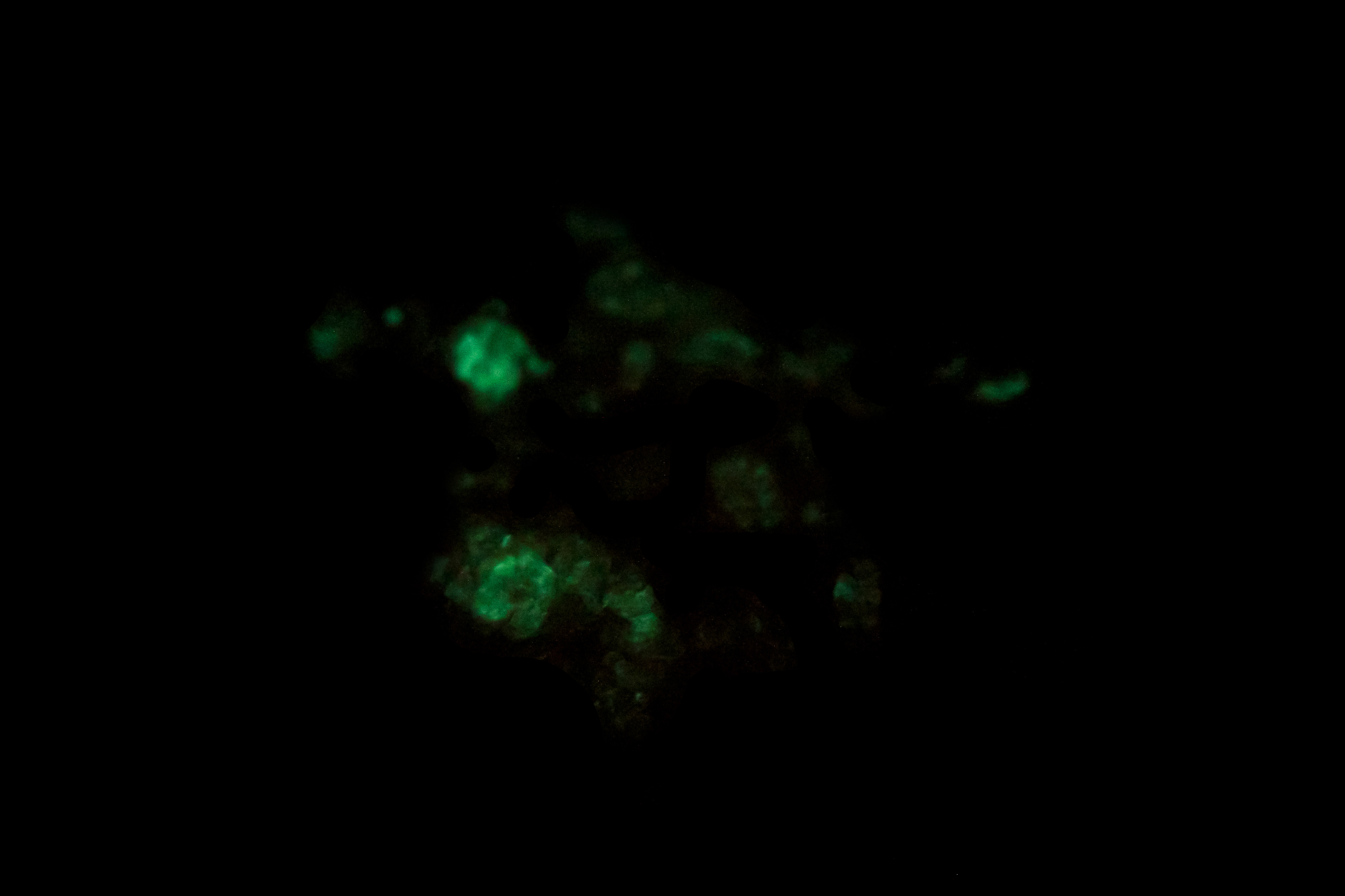 Tribolumineszenz von Uranylnitrat-Hexahydrat吴语: 硝酸铀酰六水合物个摩擦发光